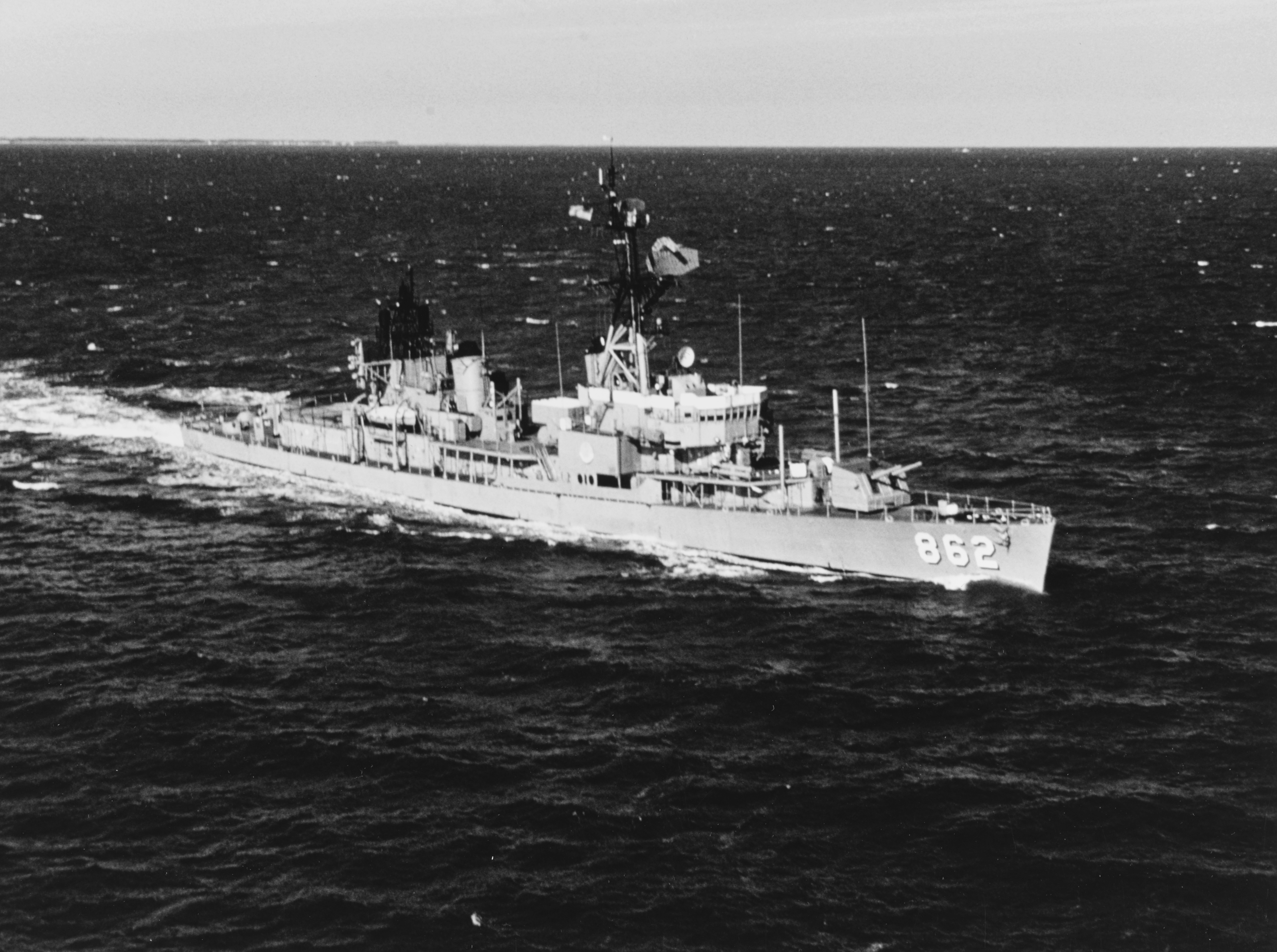 The U.S. Navy destroyer USS Vogelgesang (DD-862) underway on 1 December 1971.